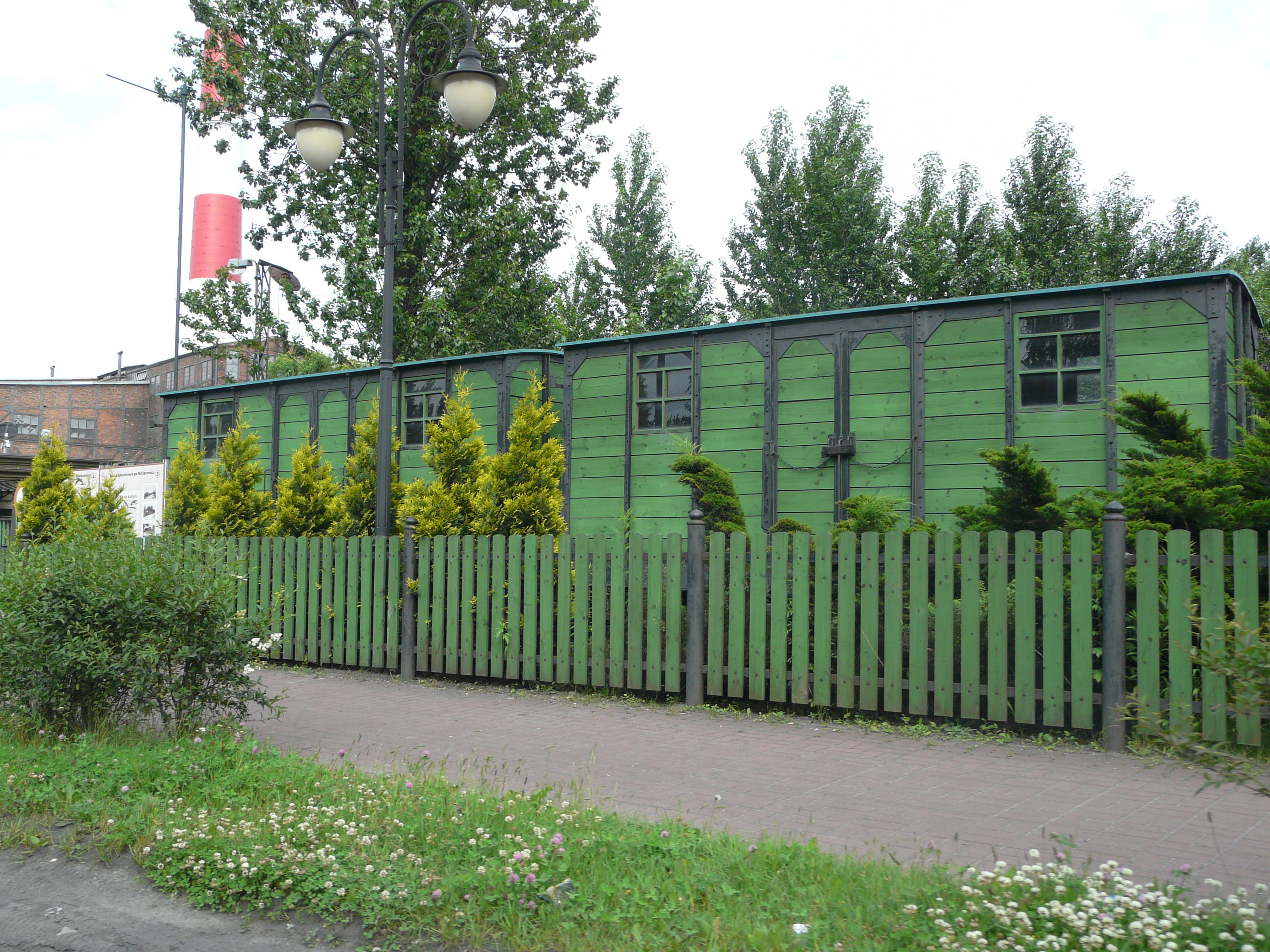 Wieczorek Coal Mine